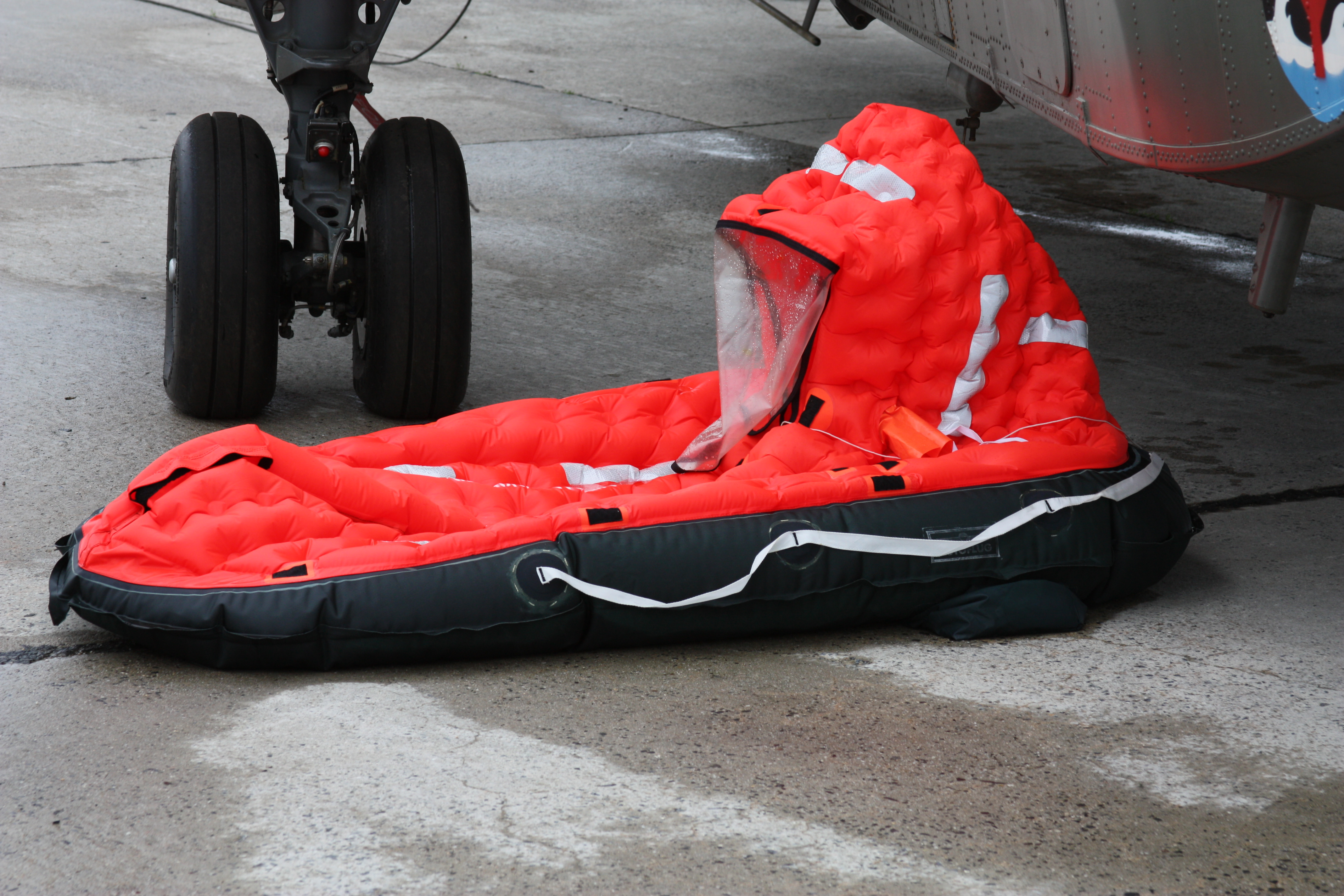 ILA 2010, am Samstag aufgenommen, meist erhöht von einer Leiter fotografiert